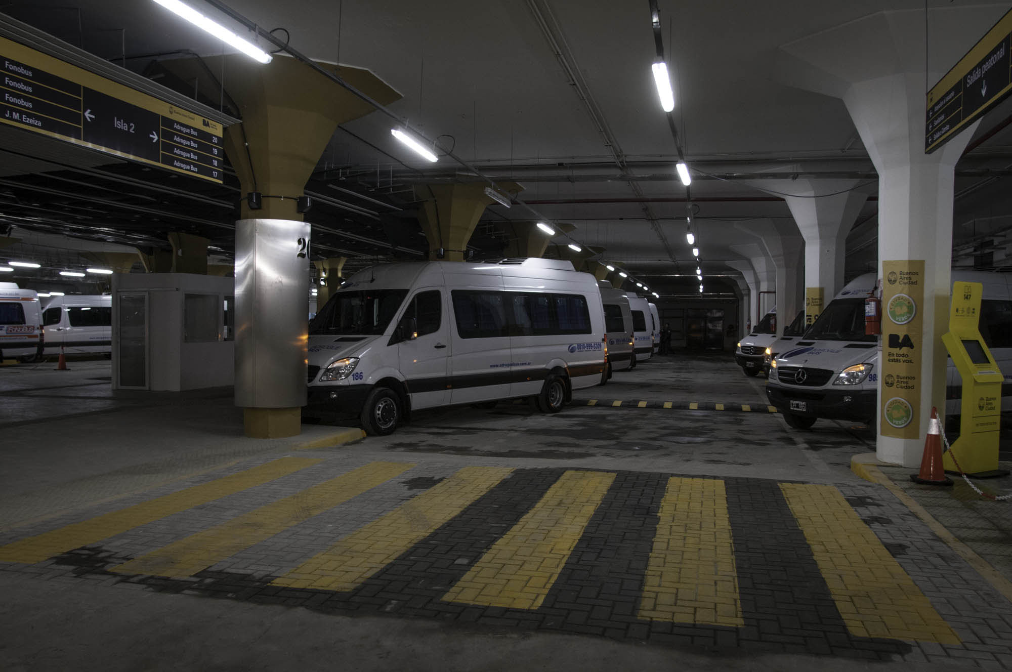 Buenos Aires. Julio 25 de 2013.- El jefe de Gobierno porteño, Mauricio Macri, inauguró hoy la Terminal de Combis Obelisco, en el centro de la Ciudad. Foto: Tony Valdez/GCBA.